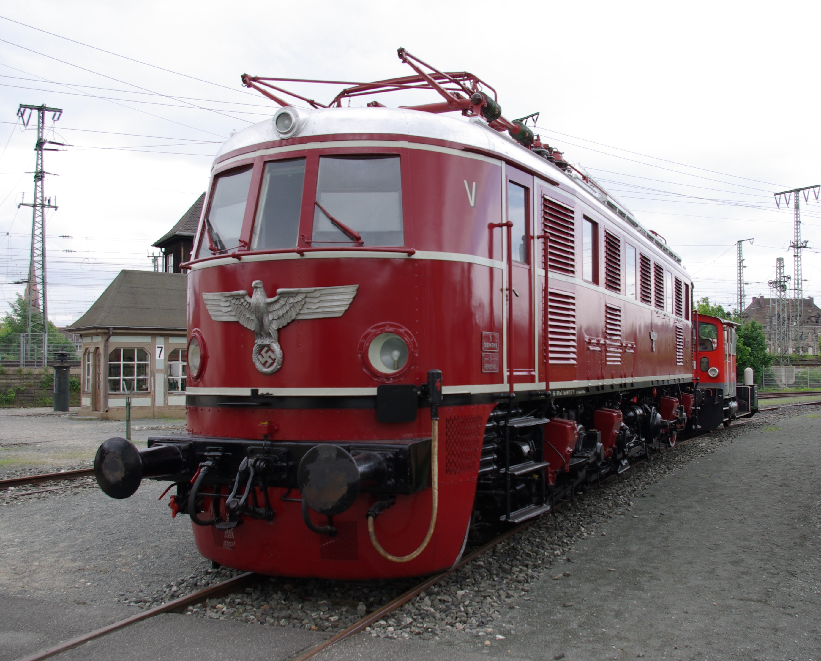 Elektrolokomotive E 19 12 im DB Museum Nürnberg